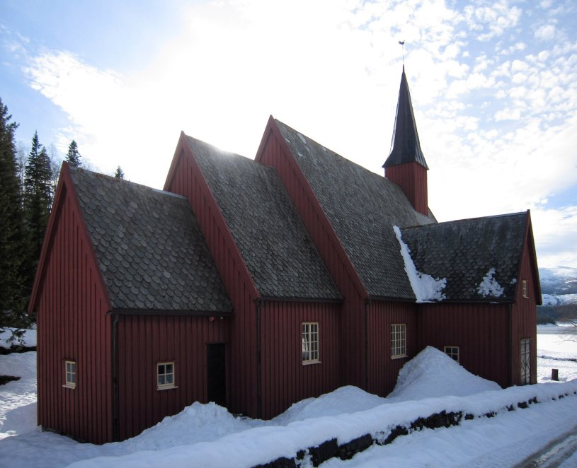 Nøstvik kirke i Velfjord - nord-Norges eldste trekirke.